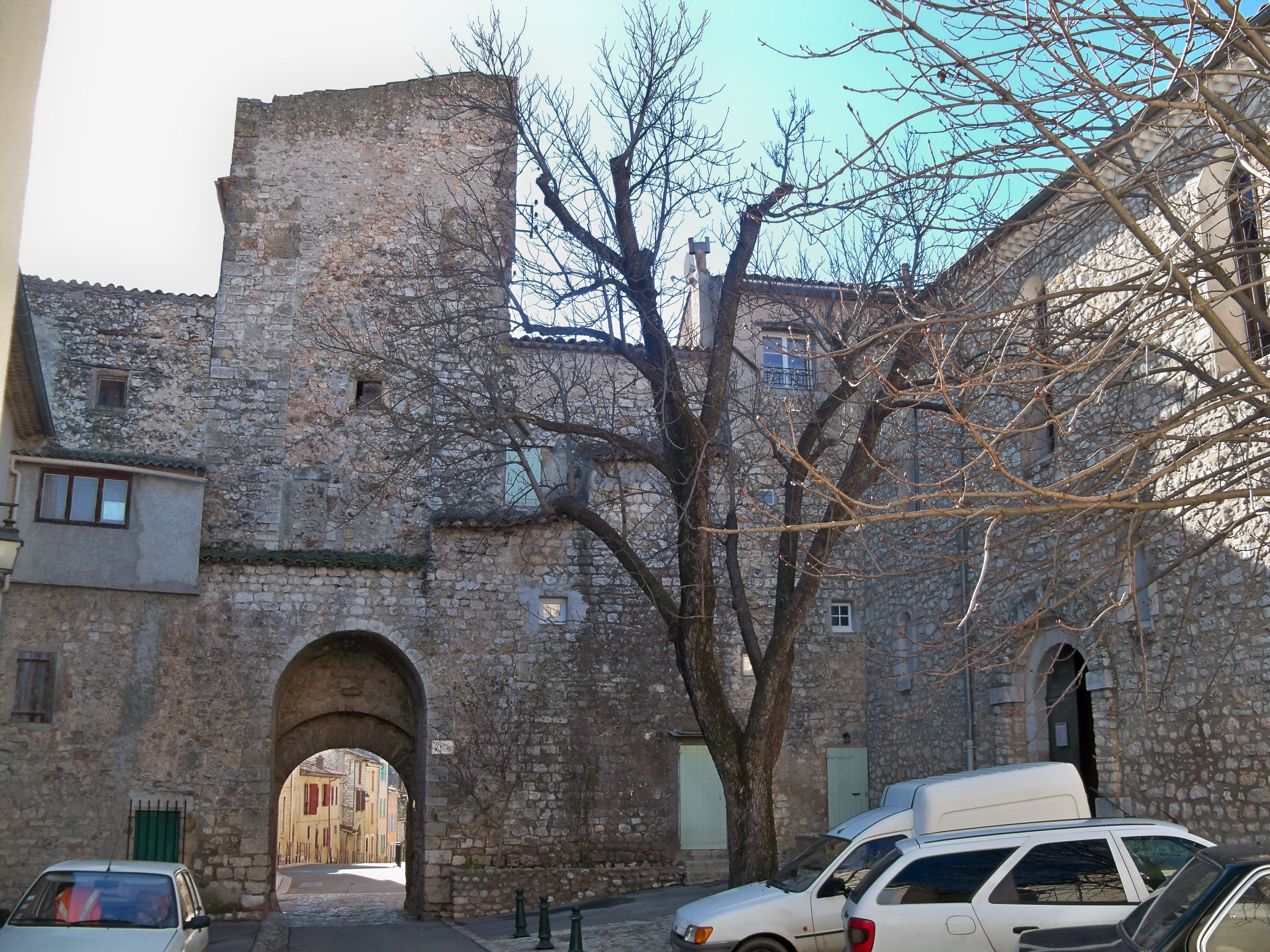 Remparts de Quinson (04), France